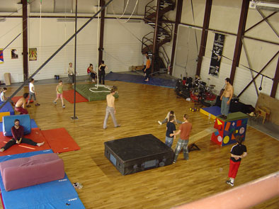 Atelier d'initiation cirque dans le terrain de jeu de La Cascade